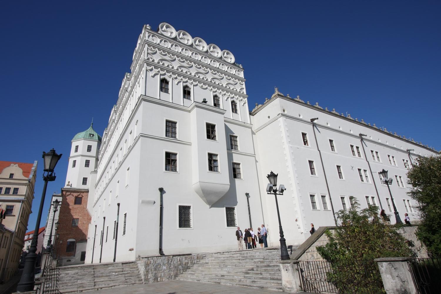 Szczecin, zamek książąt pomorskich, mur., XV-XIX, po 1945